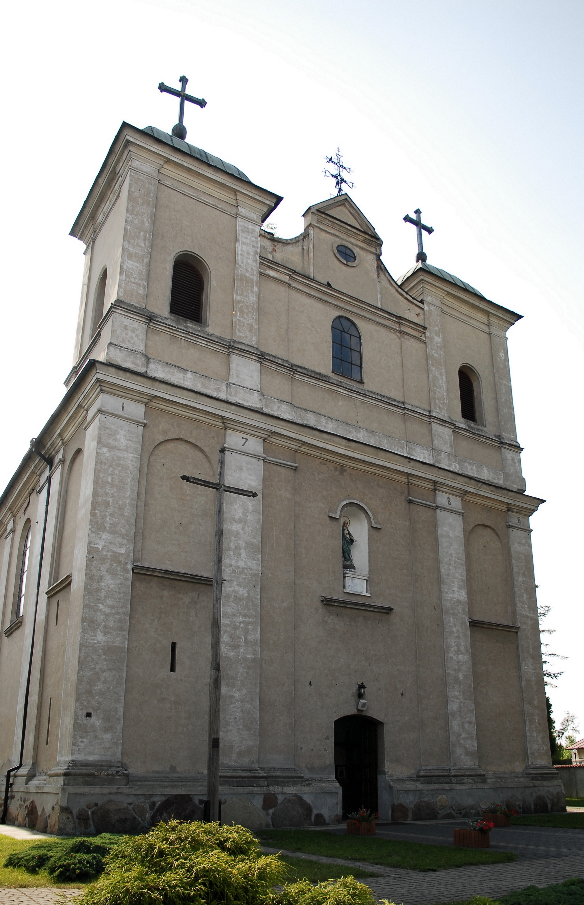 Kościół Świętej Trójcy w Wyszogrodzie.